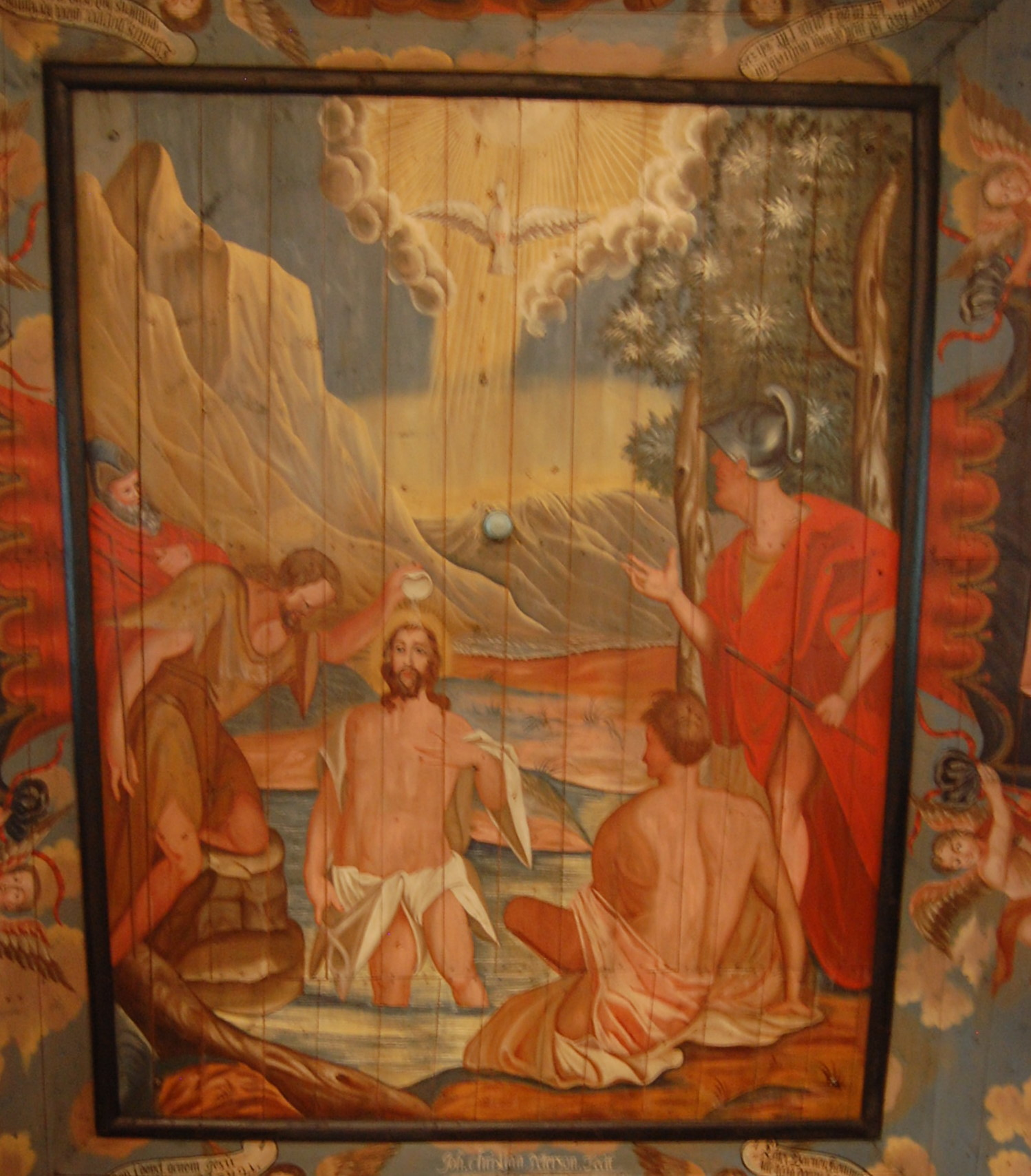 Deckenbild "Die Taufe" in der Kirche von Habo, Schweden